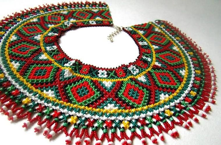 Криза